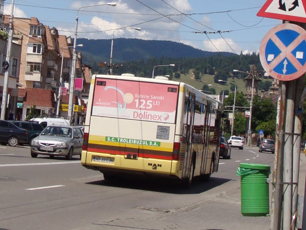 L'autobus Man NL 313 NT 22 CJN sur la ligne A3